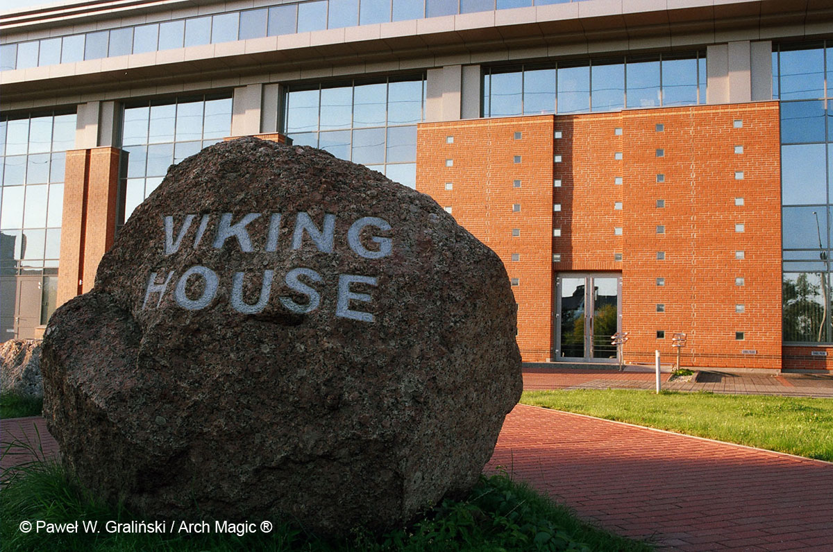 biurowiec Viking House Warszawa